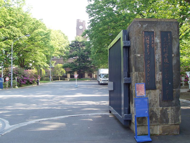 東京大学先端科学技術研究センター